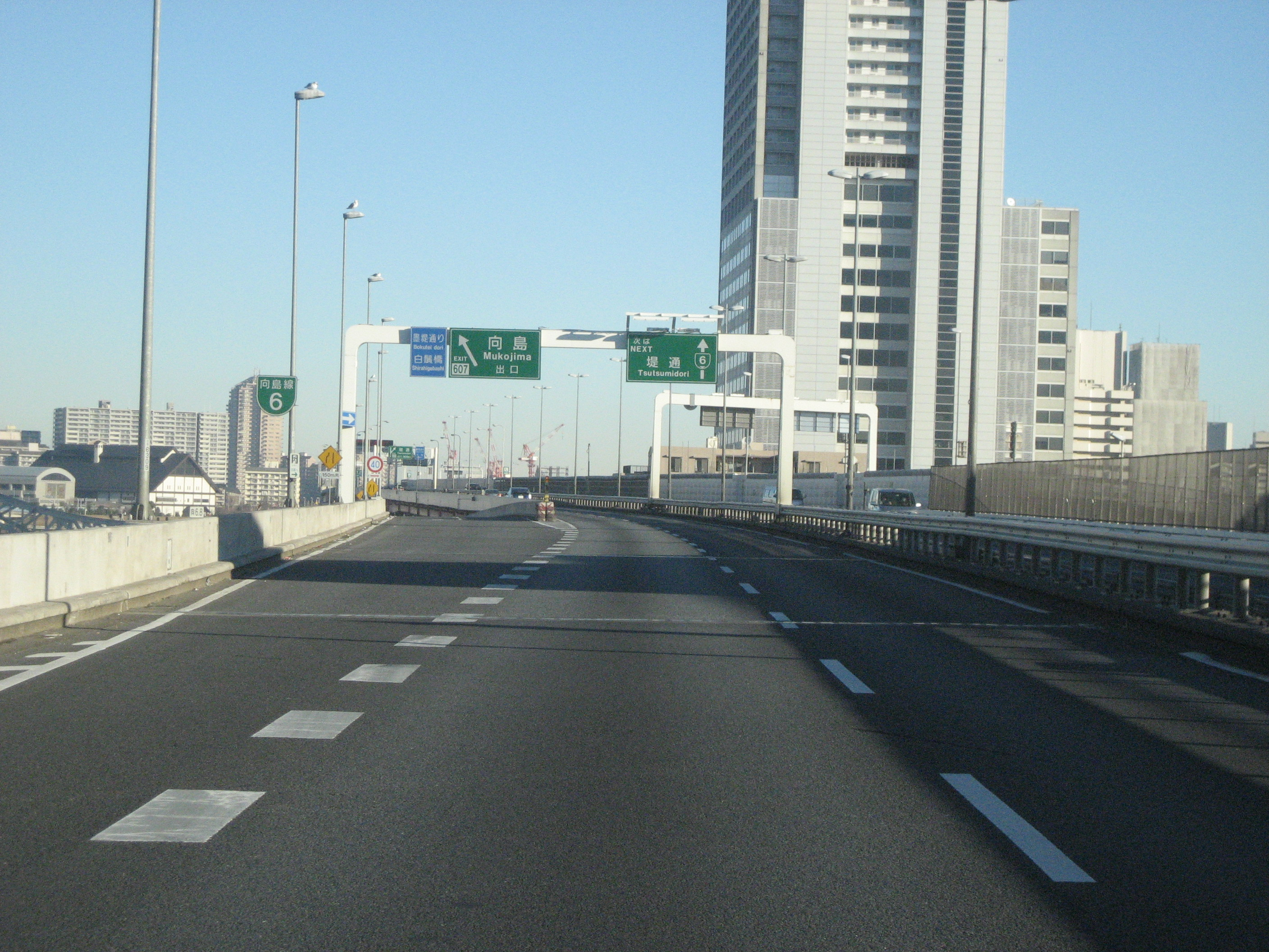 首都高速向島出入口（下り）